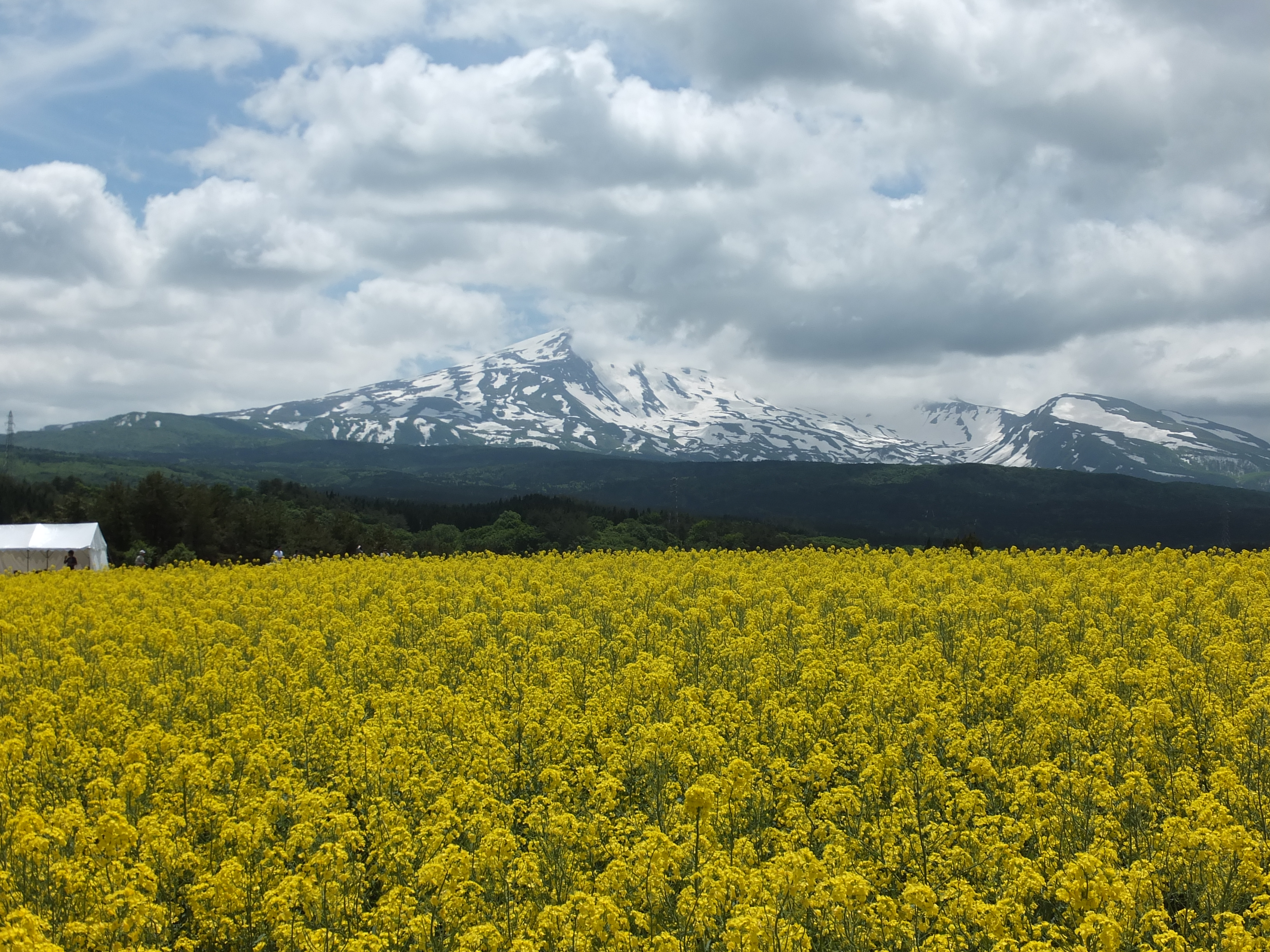 菜の花畑と鳥海山。2013年鳥海高原菜の花フェスティバルにて。祭りの運営にあたっては、秋田県立大学の教員、学生が中心的な役割を果たしている。